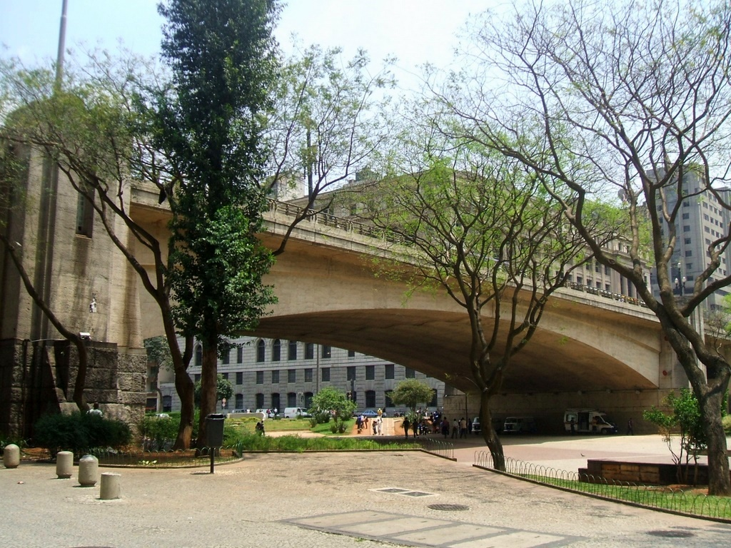 Viaduto do Chá, visto do Vale do Anhangabaú, na cidade de São Paulo, Brasil